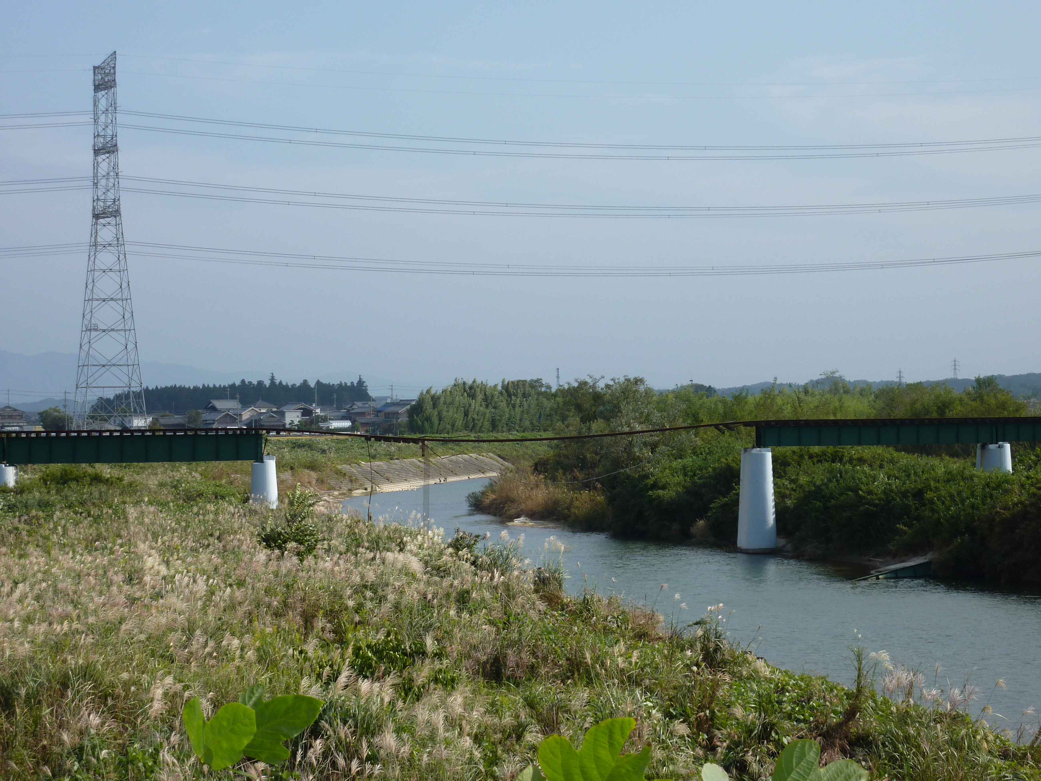 2013年9月16日の台風18号で流失した信楽高原鐵道信楽線杣川橋梁。